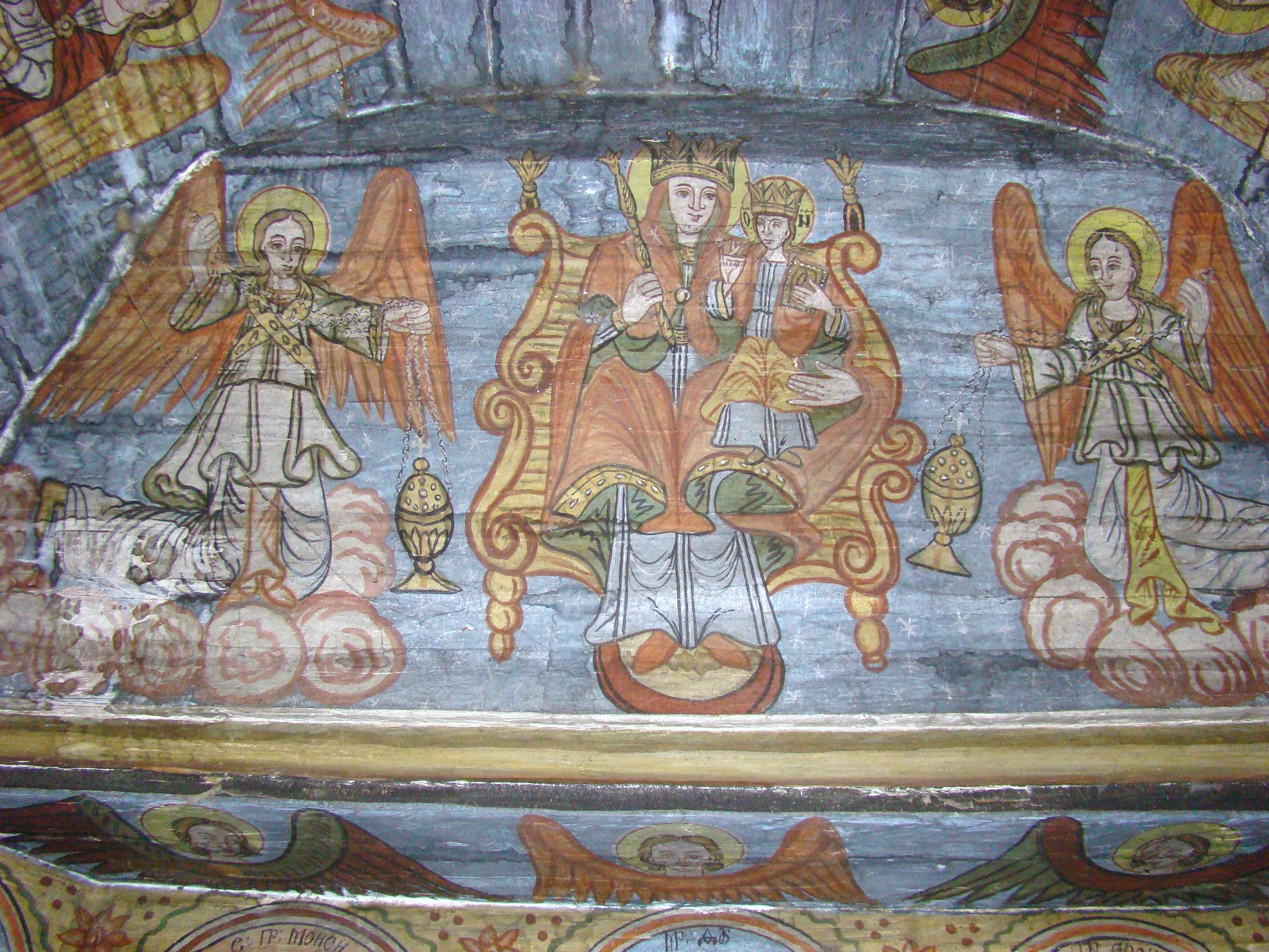 Biserica de lemn din Runc, județul Alba